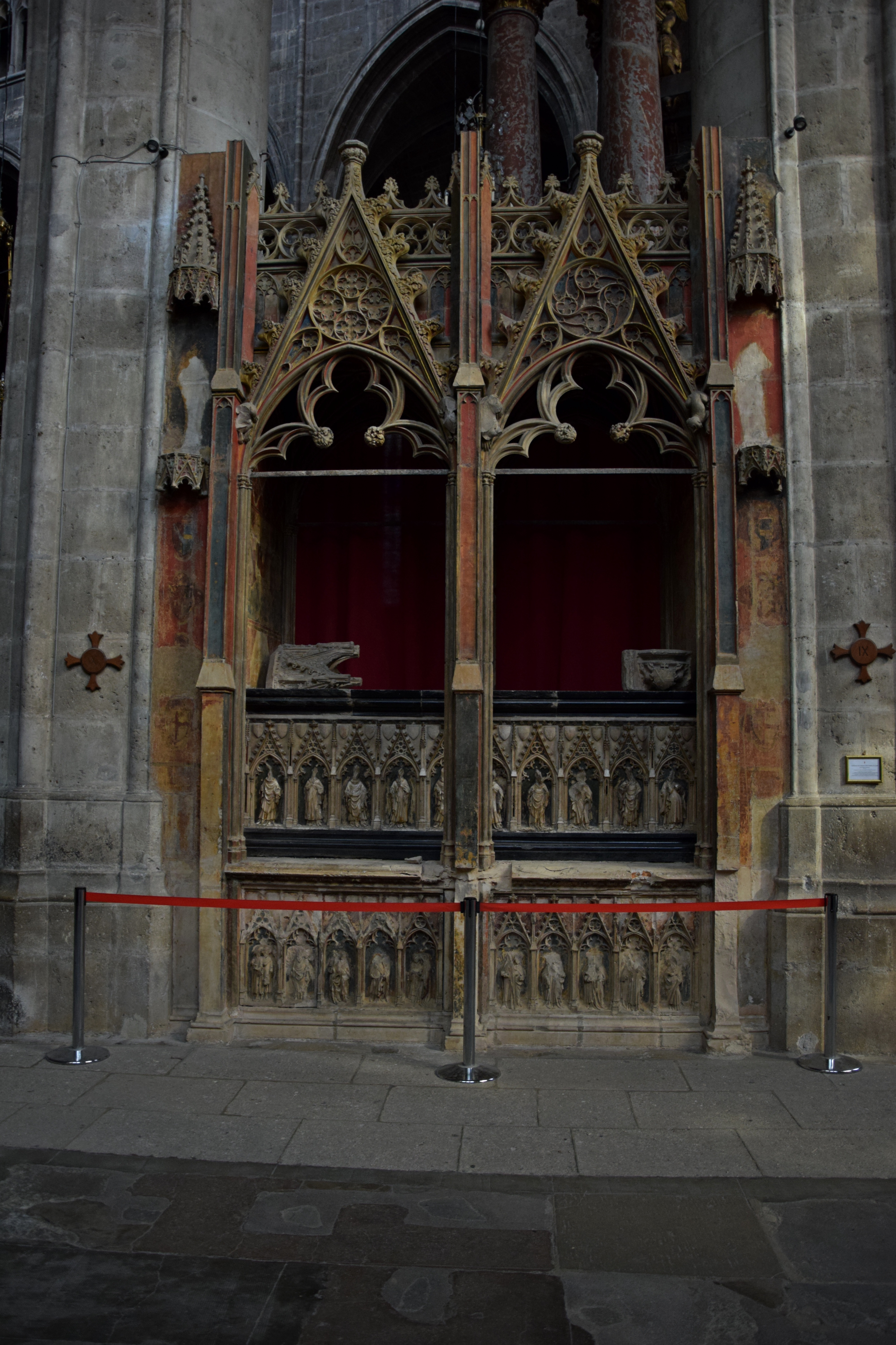 Cathédrale Saint-Just-et-Saint-Pasteur